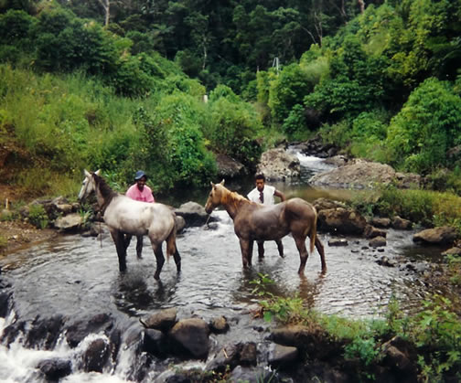 Village de Bukuya, centre de Viti Levu. Photo prise par Laurent Nevers en avril 1994.